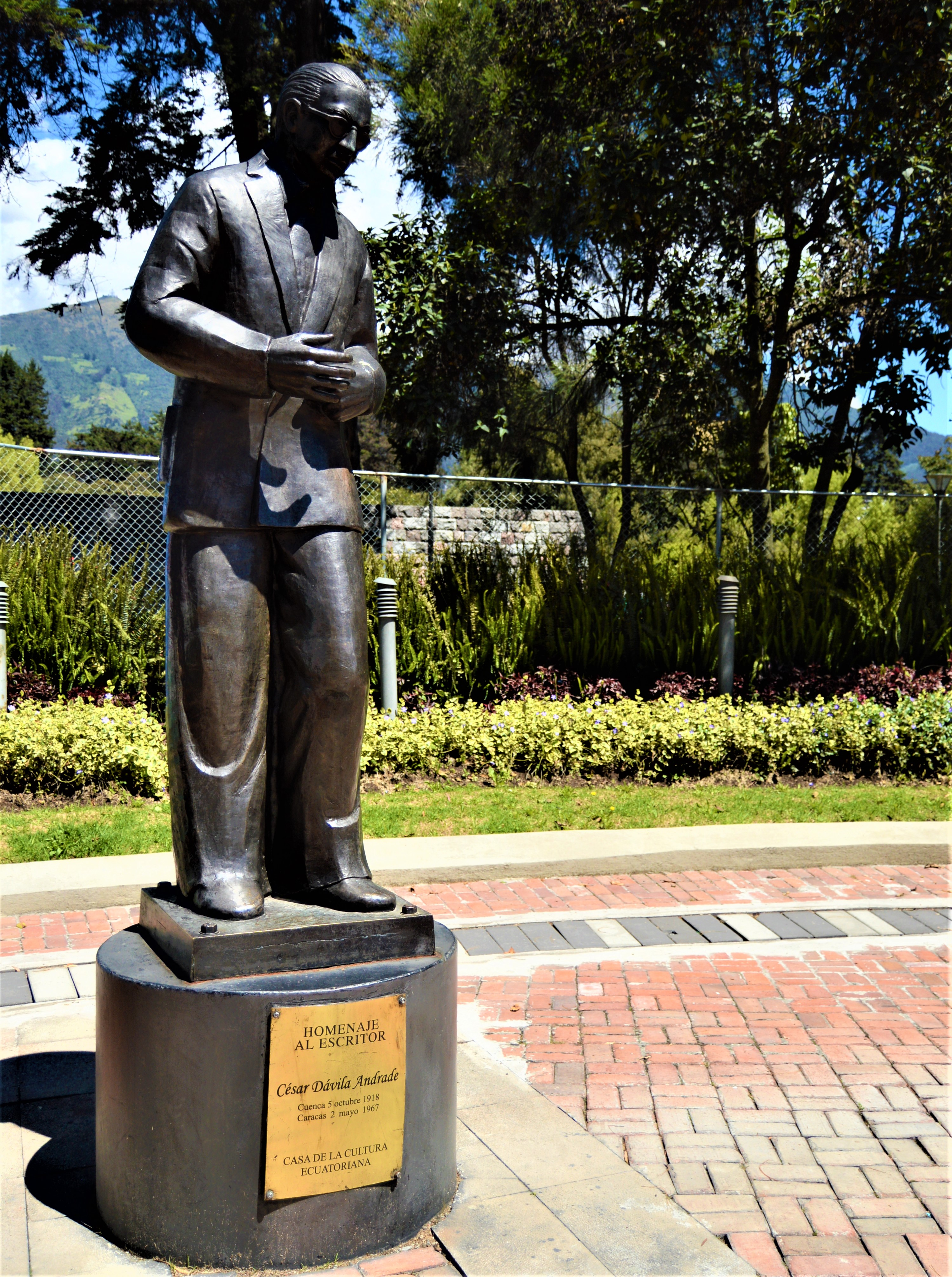 Estatua en homenaje a César Dávila Andrade por la Casa de la Cultura Ecuatoriana